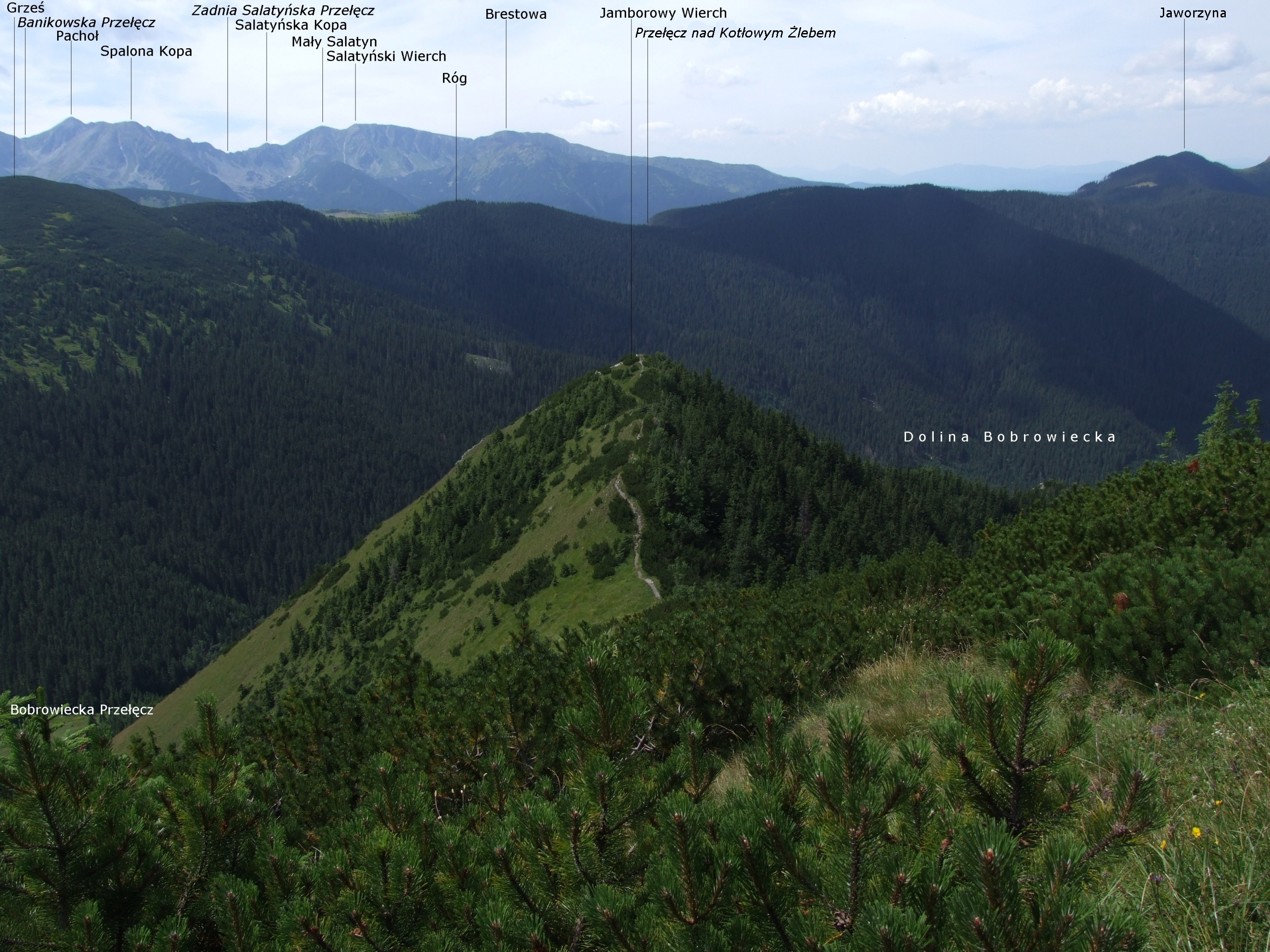 Widok z Bobrowca (Tatry Zachodnie)